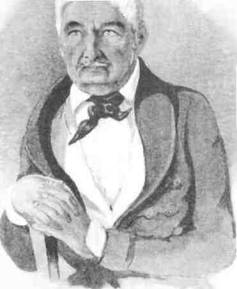 Jan Nepomucen Kamiński (ur. 27 października 1777 w Kutkorzu, zm. 5 stycznia 1855 we Lwowie) - polski reżyser, aktor, pisarz i tłumacz, dyrektor teatru polskiego we Lwowie, nazywany Ojcem galicyjskiej sceny polskiej.